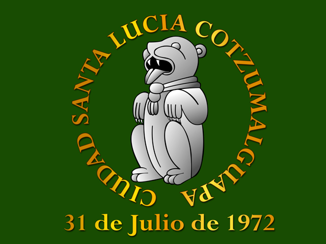 Bandera de Santa Lucía Cotzumalguapa, Escuintla, Guatemala, C.A.